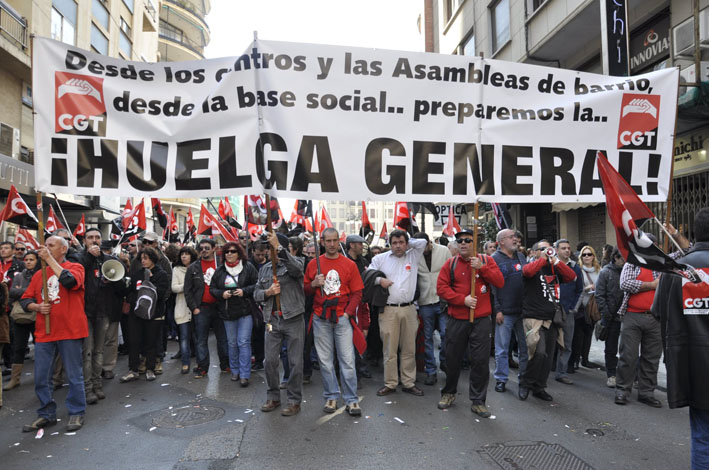 FOTO HUELGA VALENCIA